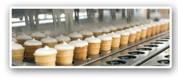 Новая линия «Iglo Line» по производству мороженого в стаканчике